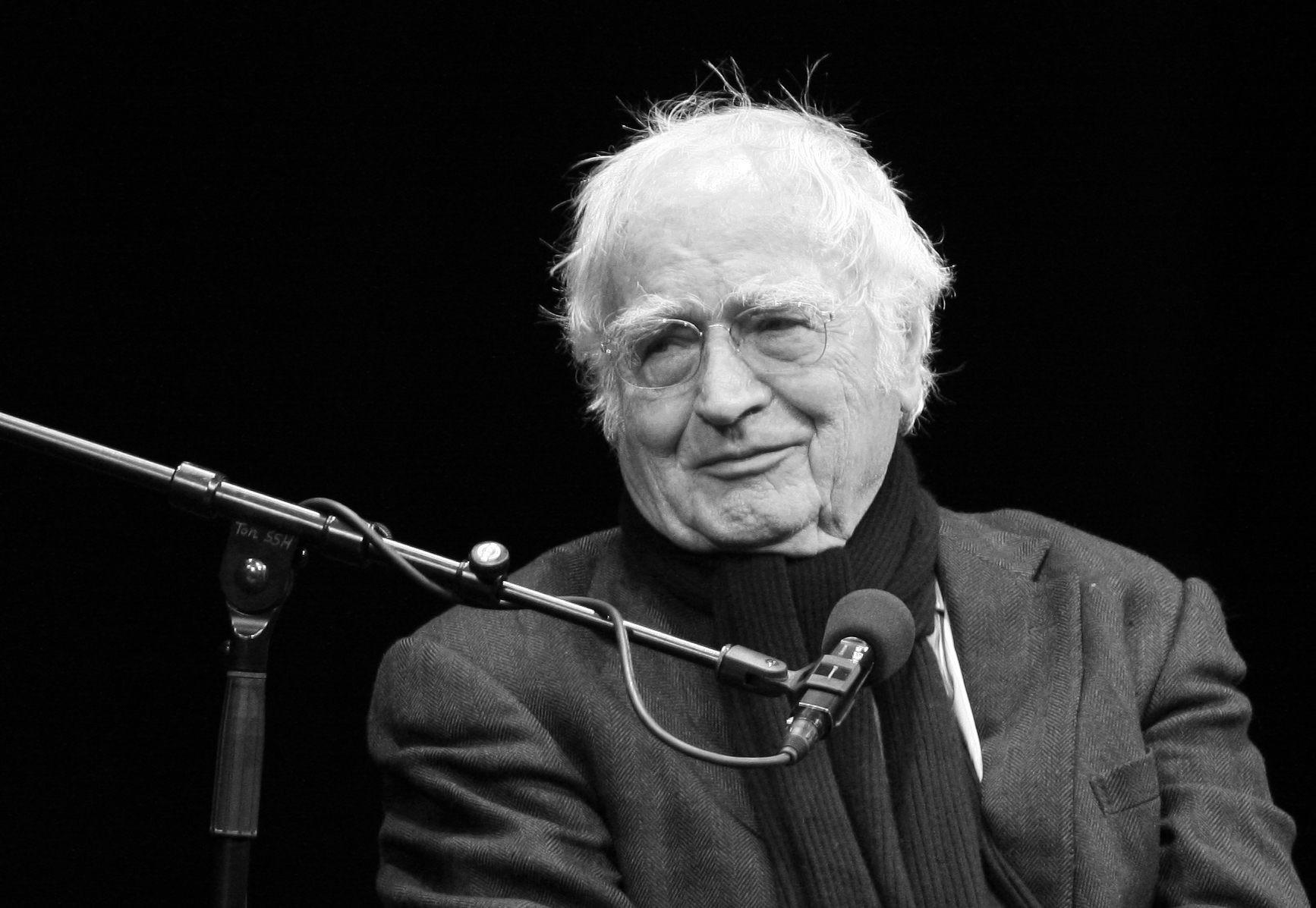 Martin Walser, deutscher Schriftsteller, während einer Lesung auf dem Literaturfestival lit.Cologne 2010